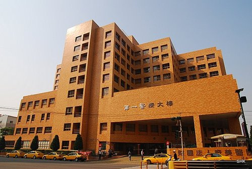 奇美醫院永康院區第一醫療大樓。